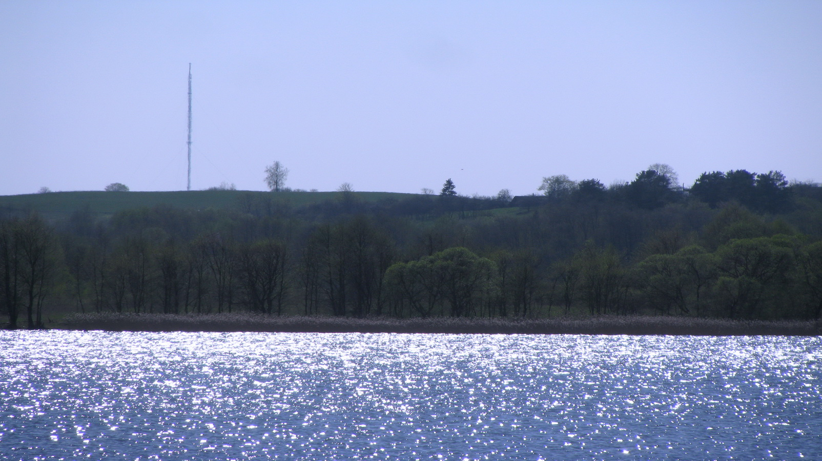 Озеро Гомель, Полоцкий район